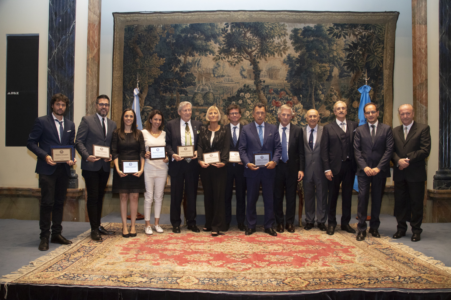 Foto de grupo de los ganadores - Premio L'Italiano 2019